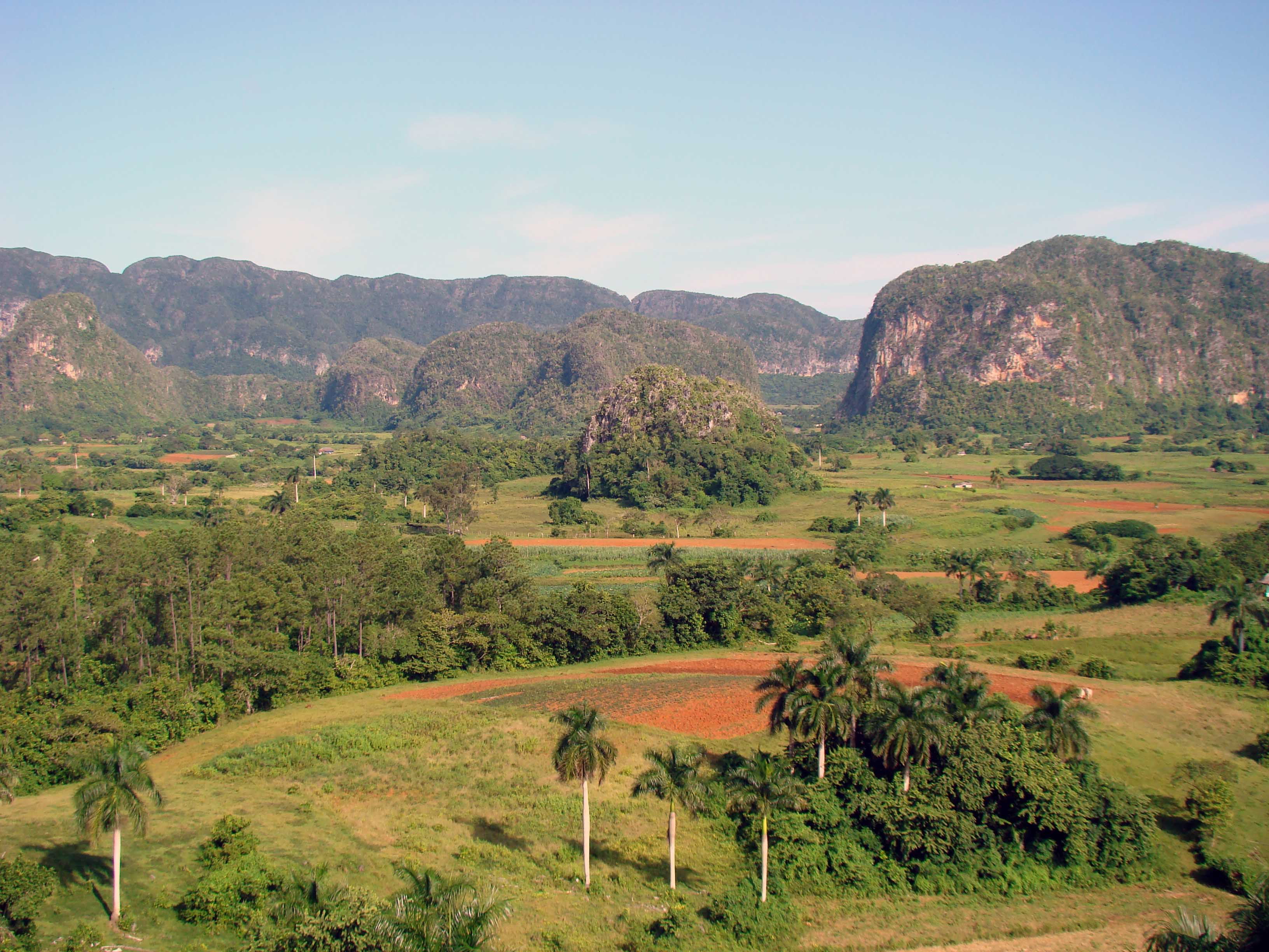 Valle de Viñales